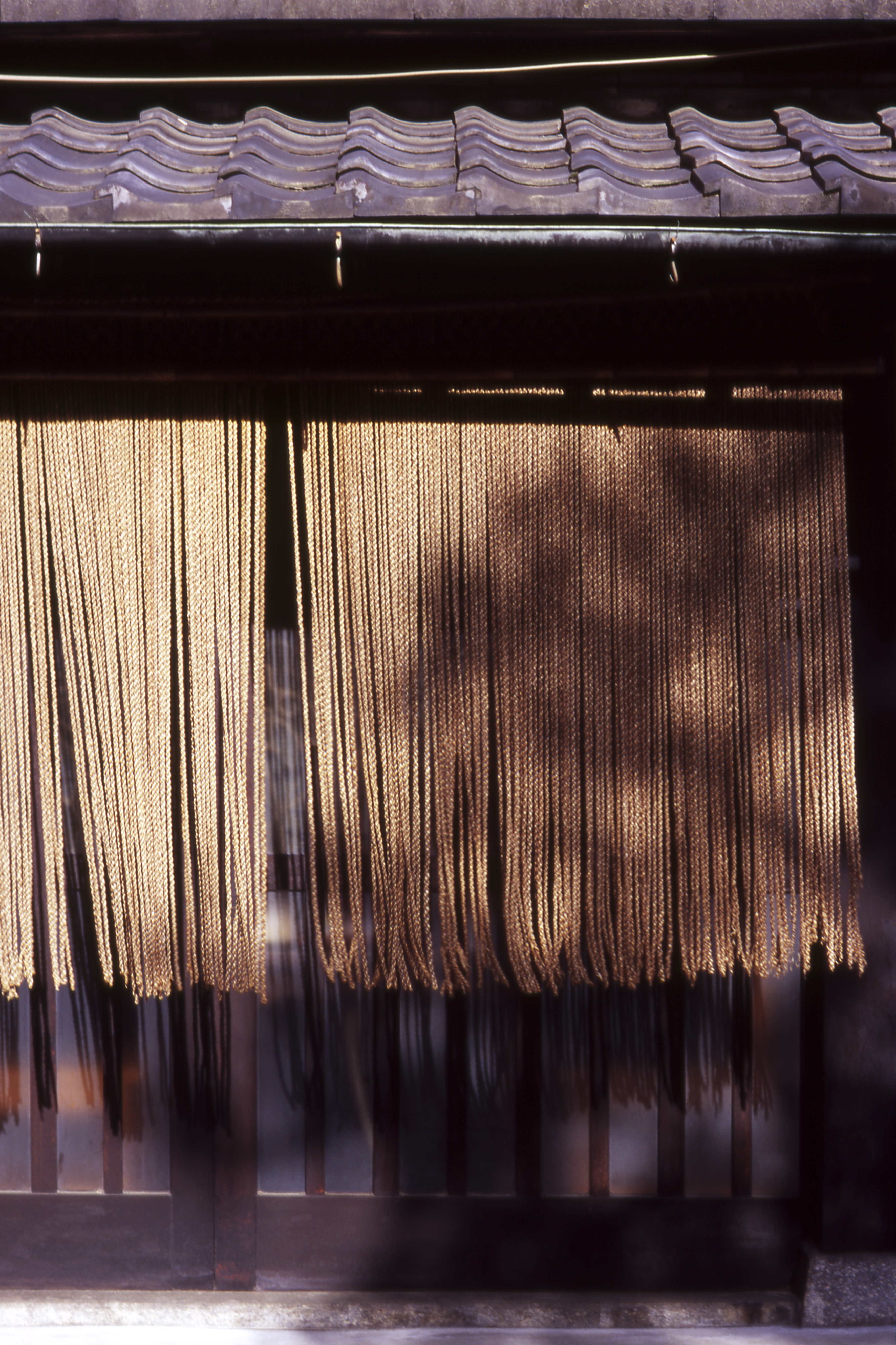 k_0155